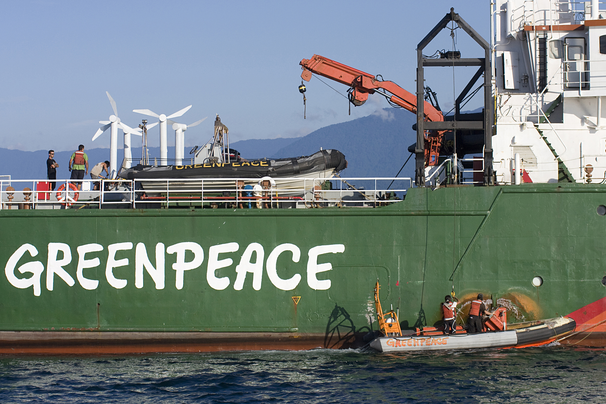 Angra dos Reis, Rio de Janeiro. 07/04/2009. Ativistas do Greenpeace instalam balsa flutuante com quatro turbinas eólicas simbólicas em frente às usinas nucleares de Angra dos Reis (RJ) para protestar contra os investimentos do governo brasileiro na construção de Angra 3 enquanto o potencial eólico do país é desprezado. Esta foi a última atividade da expedição "Salvar o Planeta. É Agora ou Agora" que, desde janeiro, percorreu sete cidades brasileiras para debater com a sociedade, indústria e governo soluções reais para combater o aquecimento global.